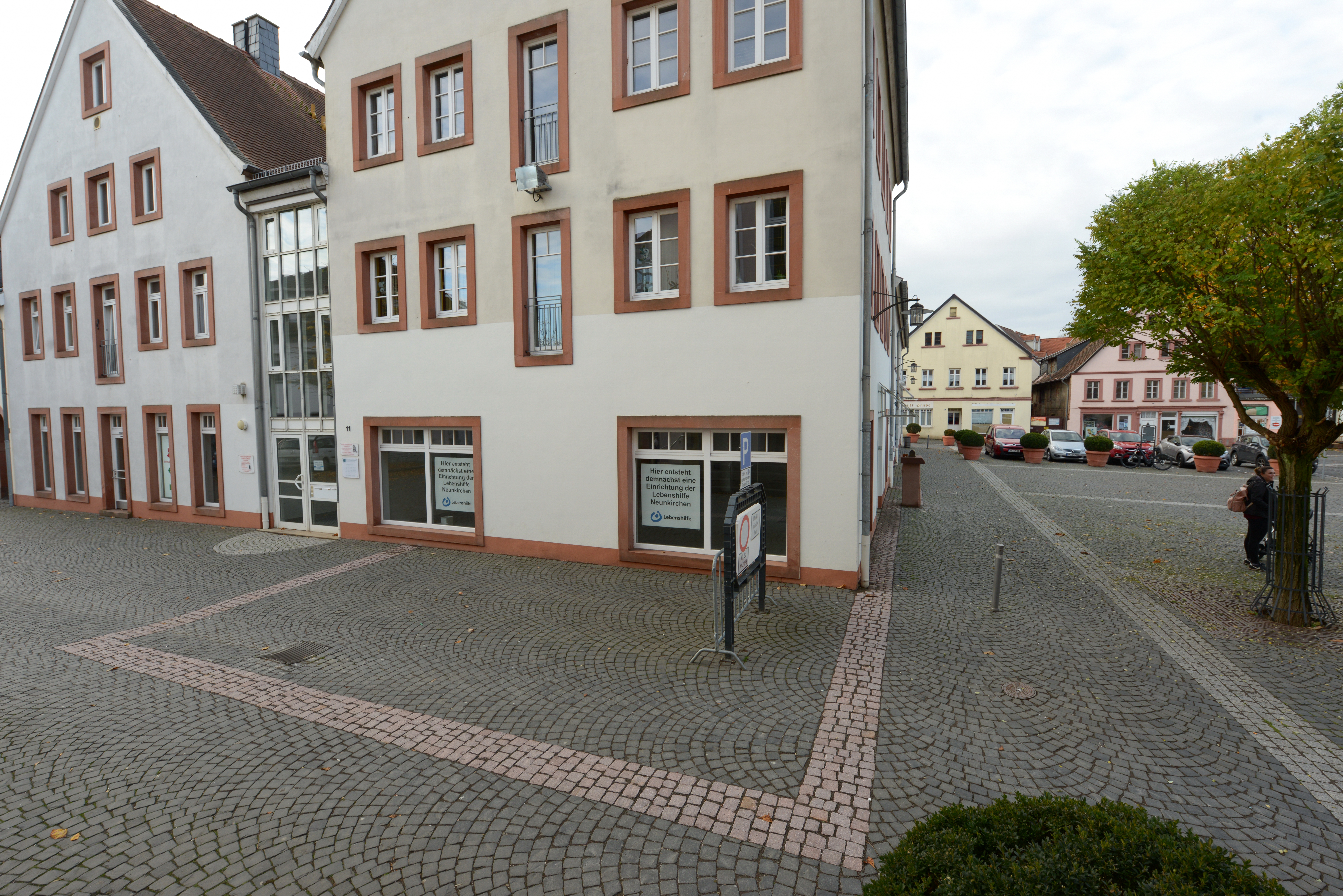 Die Grundmauer der ehemaligen Synagoge in Ottweiler wurde mit roten Pflastersteinen markiert. Die Synagoge wurde bei den Novemberpogromen 1938 zerstört, die Steine 2018 eingebaut. Standort: Schlossplatz 4, Ottweiler, Saarland/ Deutschland.